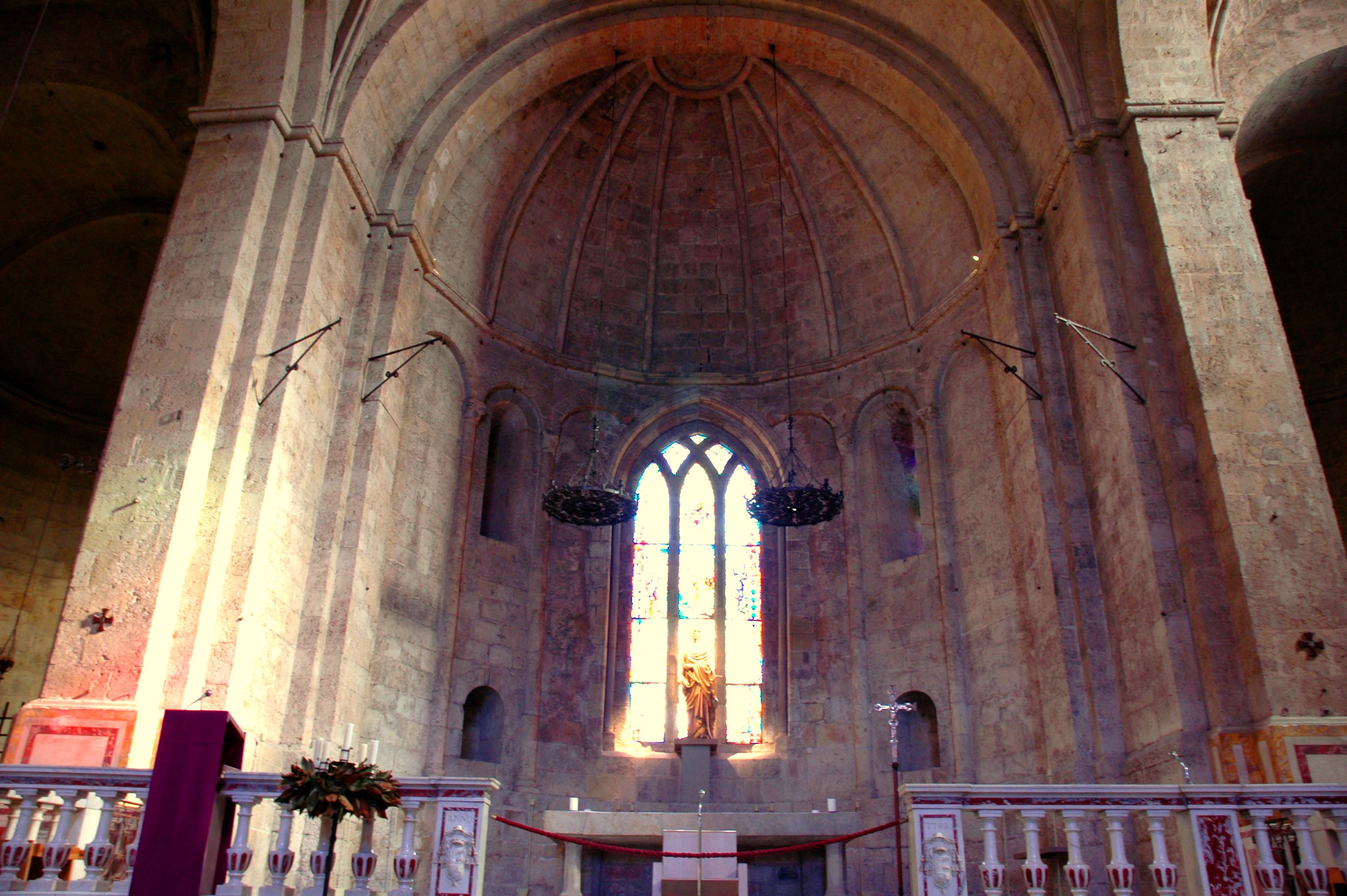 Monestir de Sant Cugat - Absis